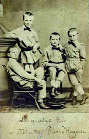 Familieportret van de vier zonen van Petrus II Regout en Amélie Polis: Petrus (III), Jules, Ernest en Alfred. De foto bevindt zich in het Album de la famille de Mr. Pierre Regout à Maestricht, vervaardigd omstreeks 1869 door Billon, rue des Recollets, 13, Parijs ("Photographe, Neveu et Élève de Mr. Daguerre"). Het bevat foto’s van diverse leden van de familie Regout en van de prenten uit het Album dédie à mes enfants et mes amis. Fotocollectie RHCL Maastricht, RAL P-0656-101.